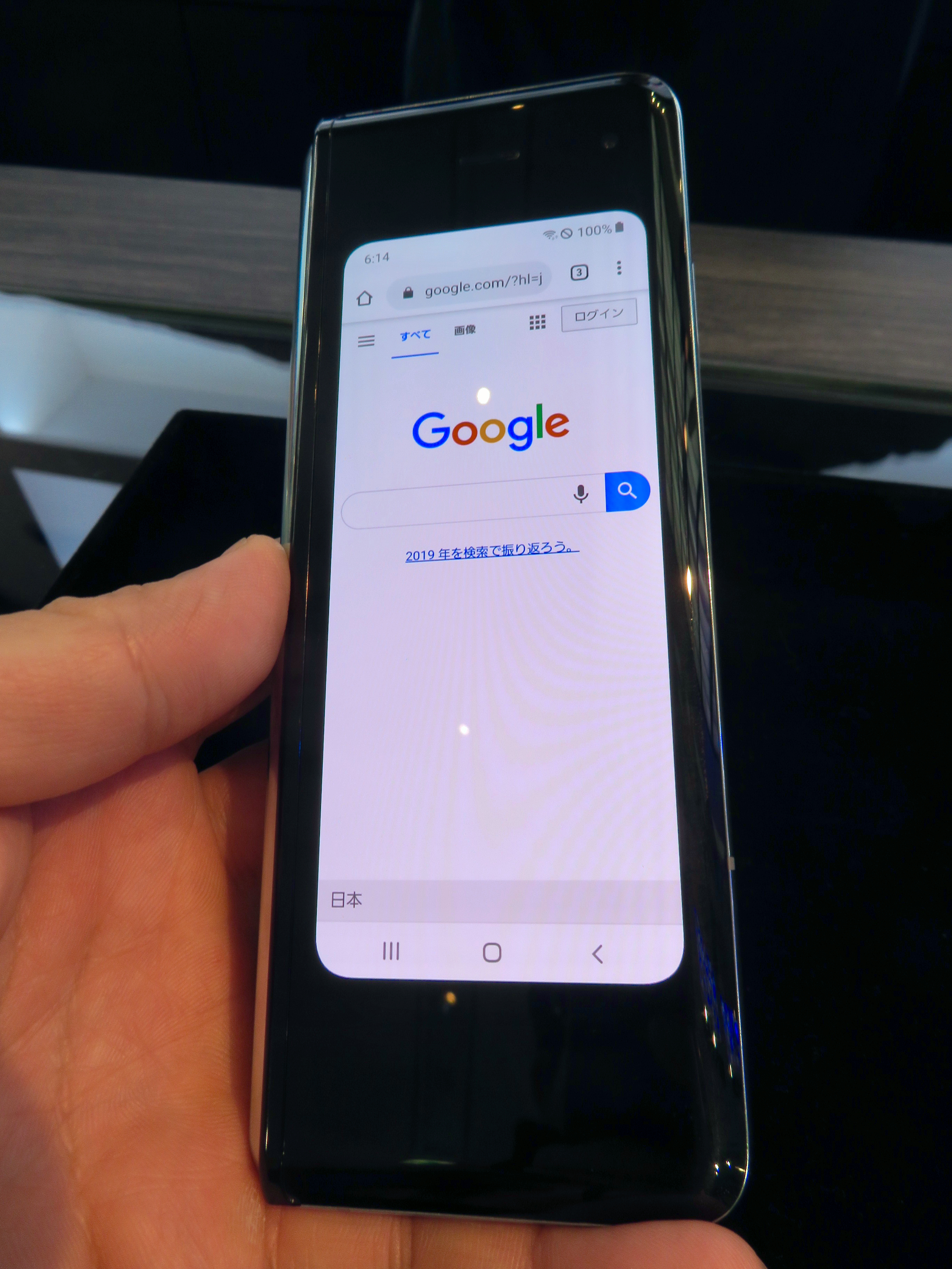 Samsung社の折りたたみ式スマートフォン「Galaxy Fold」。